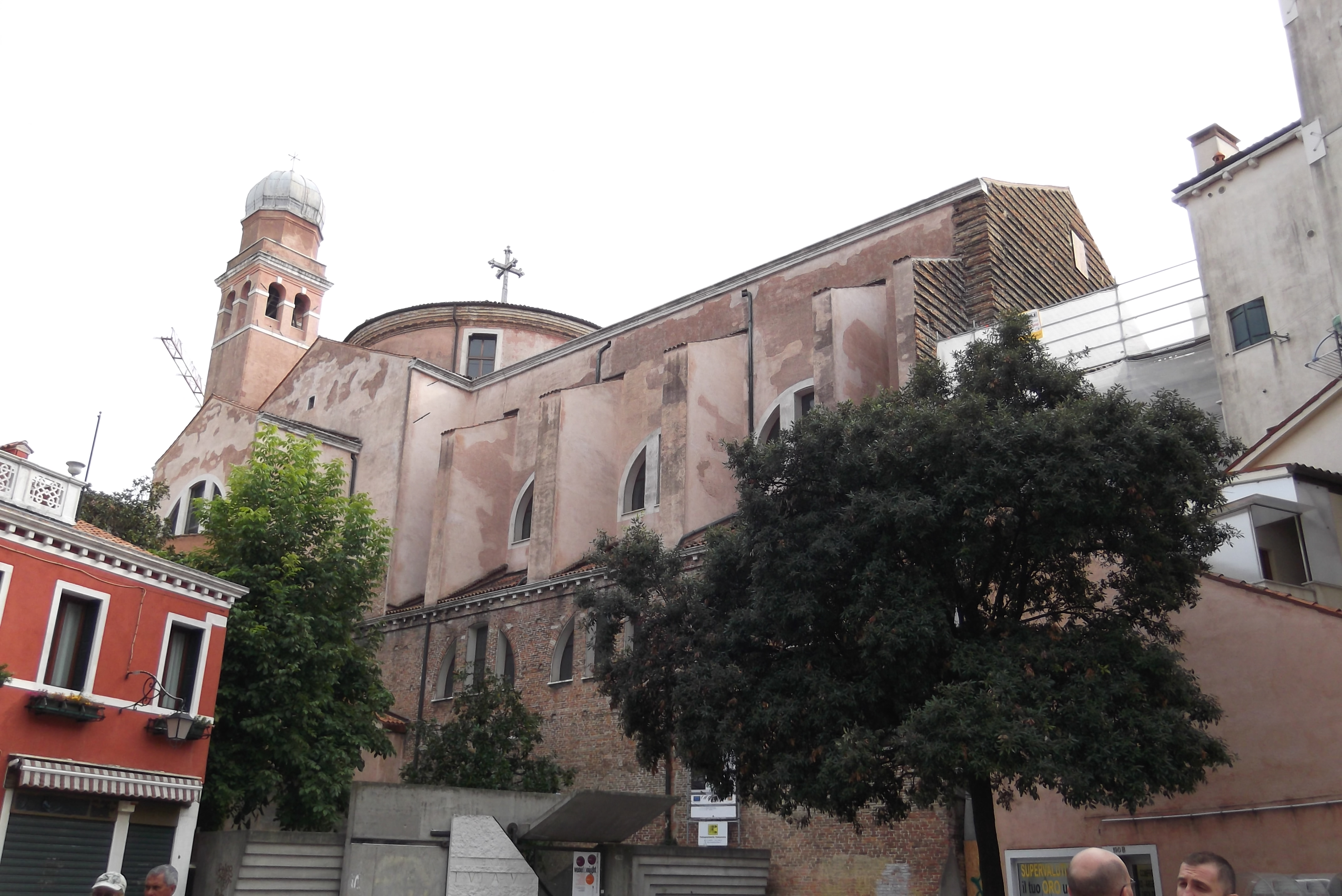 Santa Croce, 30100 Venezia, Italy